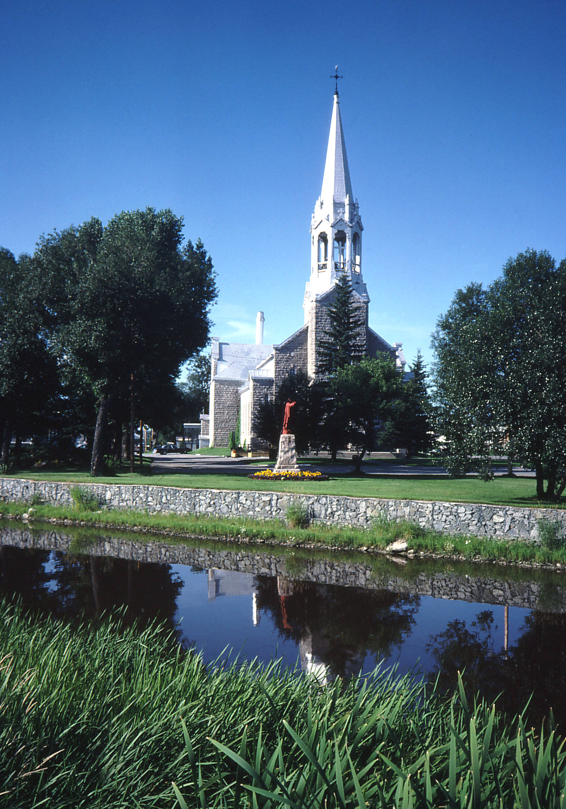 Église de La Sarre